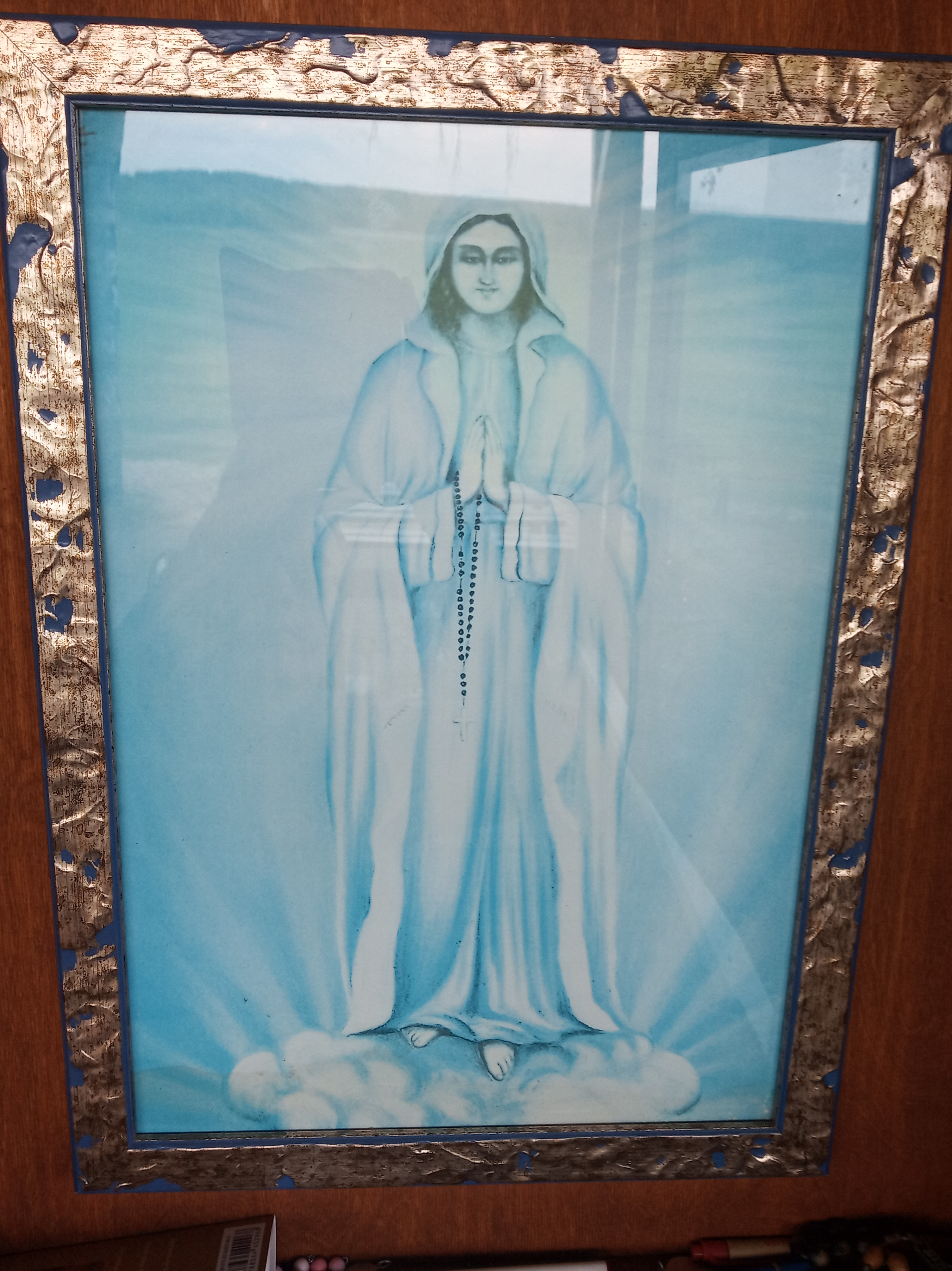 Kopia obrazu Matki Bożej Mazurskiej